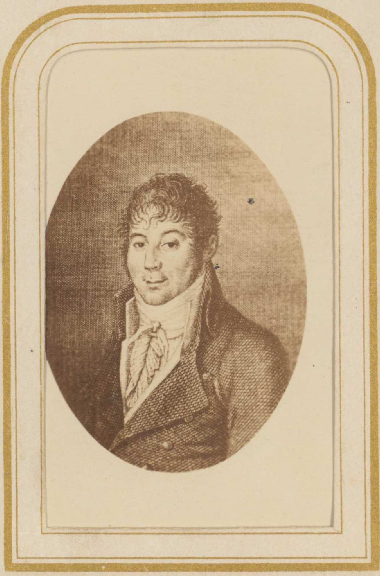 Eusebio Juliá, Retrato de Francisco de Paula Martí, fotografía en papel albúmina de un grabado hecho por él mismo. Inscripción al dorso: "Retrato de D. Francisco de Paula Martí / natural de San Felipe de Játiva, tomado / de un grabado hecho por el mismo. Murió / en julio de 1827 en la ciudad de Lisboa / a los 65 años de edad" Biblioteca Nacional de España.